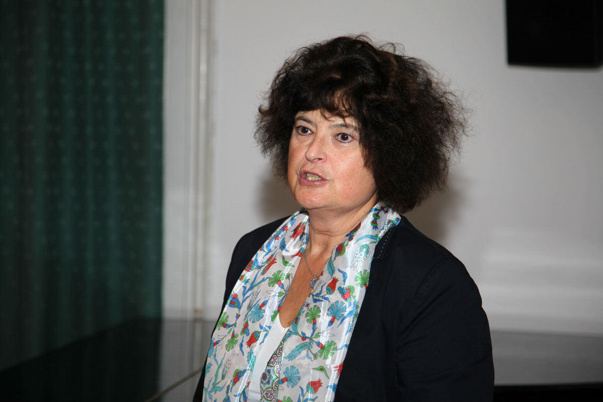 Dr. Carmen Ottner-6360